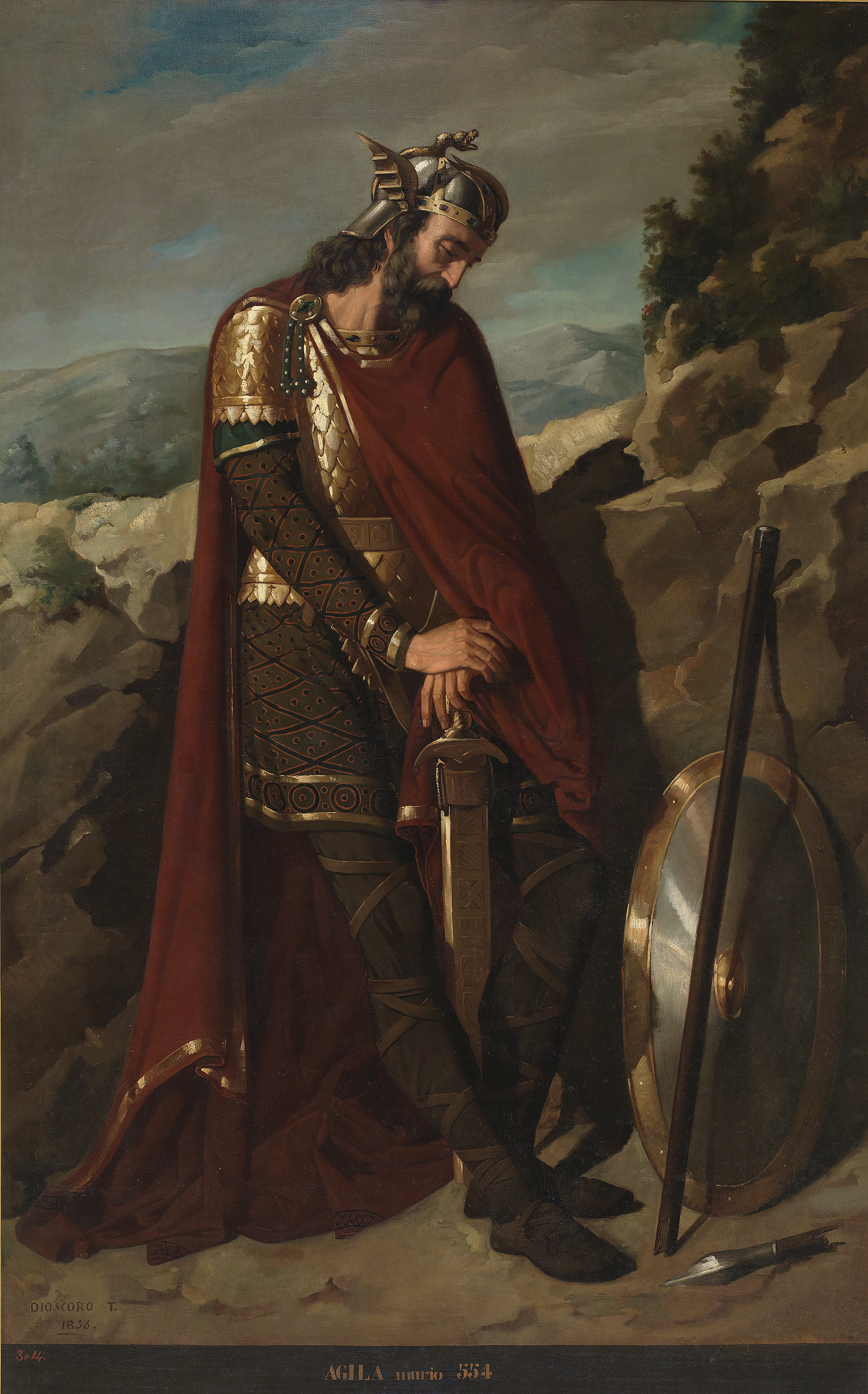 El lienzo representa a Agila I (¿?-554), rey de los visigodos, que reinó entre los años 549 y 554. Sucedió al rey Teudiselo y fue sucedido a su vez por el rey Atanagildo. El rey Agila I está representado de perfil, con armadura, apoyando ambas manos en la espada y en actitud meditabunda. Al fondo, un paisaje con rocas sobre las que, en el ángulo inferior derecho, se apoya el escudo. El lienzo pertenece a la colección del Museo del Prado, aunque se encuentra depositado en el Congreso de los Diputados de España.